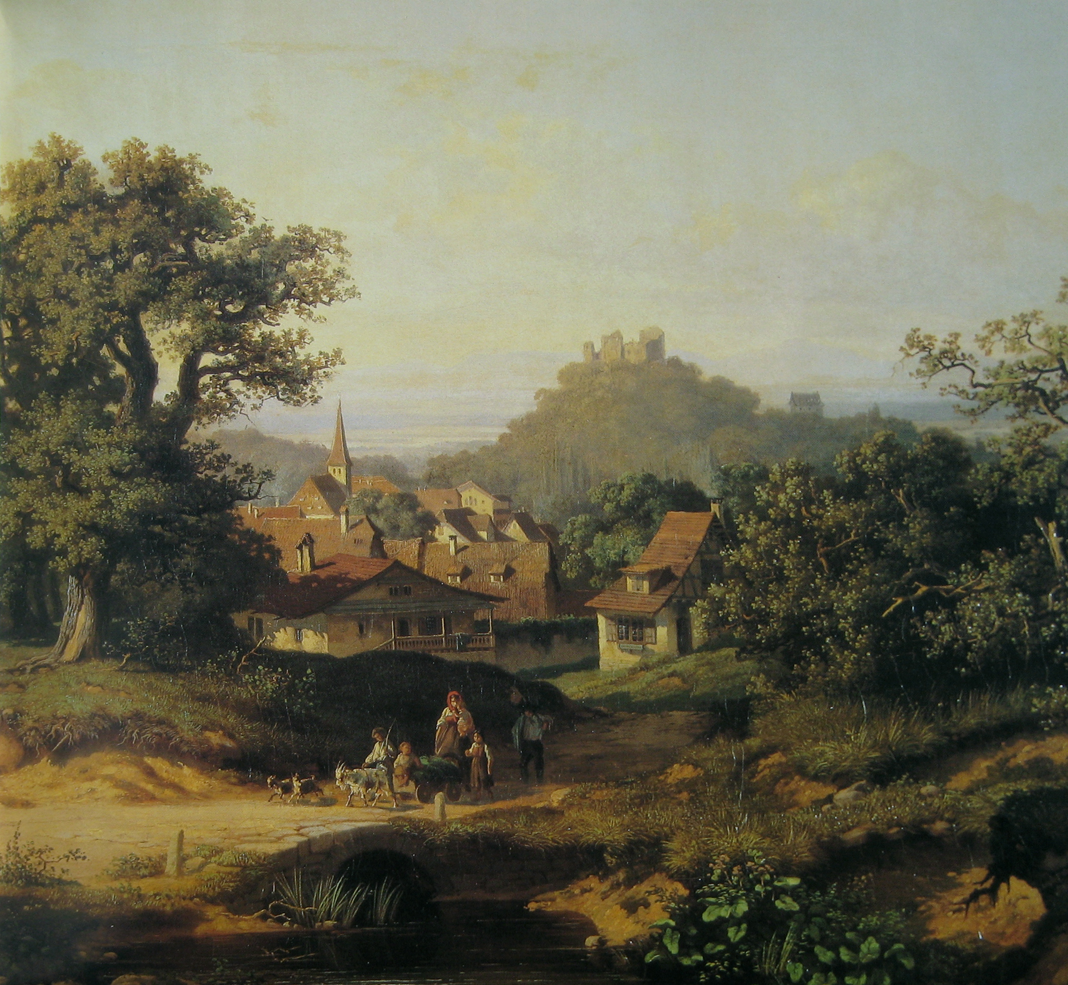 Badenweiler mit Burg Baden. Badenweiler/Süd-Schwarzwald/Deutschland